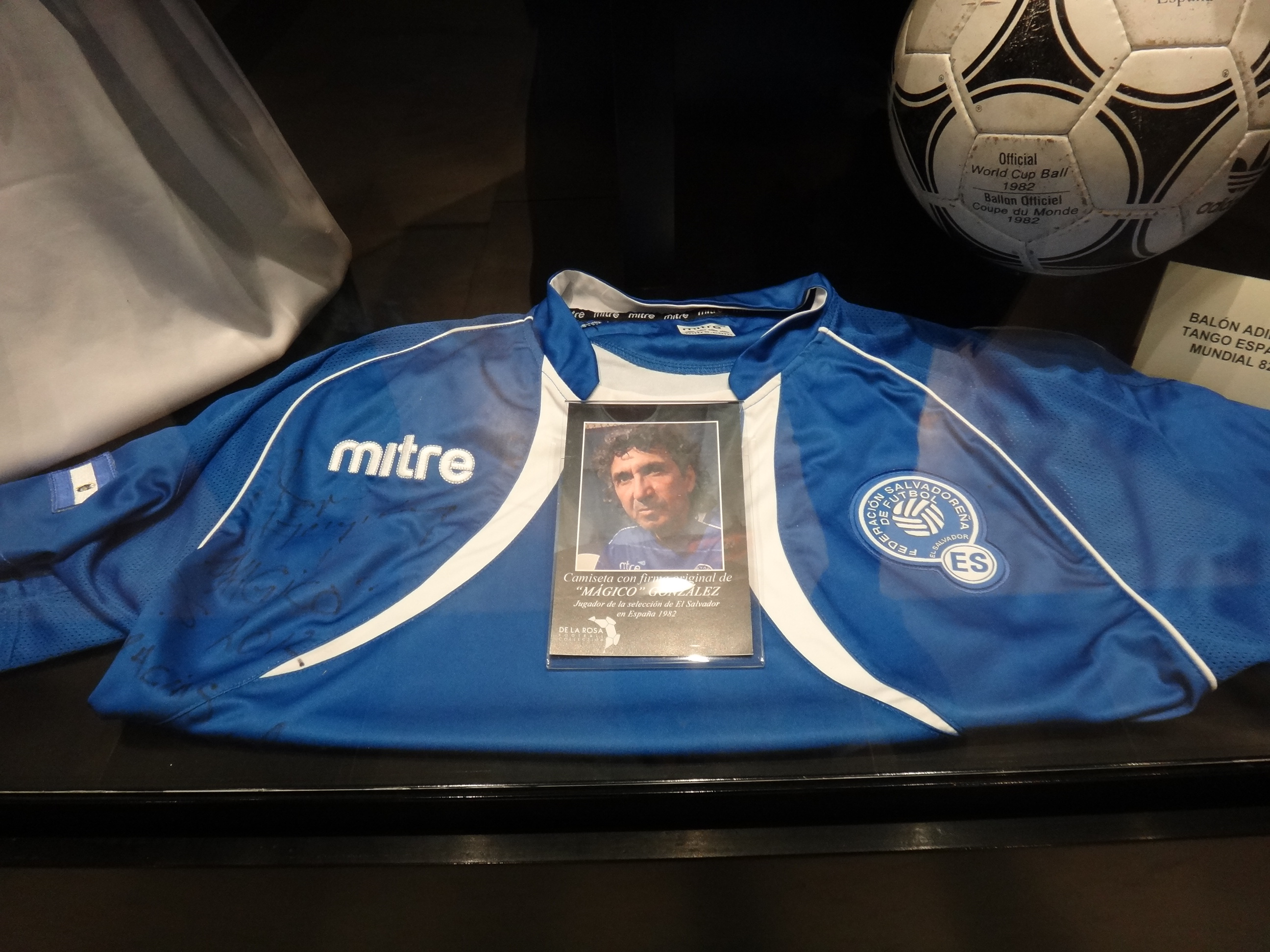 Camiseta de El Salvador firmada por Mágico González. Exposición ‘De Uruguay a Sudáfrica’ de Antonio de la Rosa (‘De la Rosa Football Collection’) en Jerez de la Frontera (Andalucía, España)